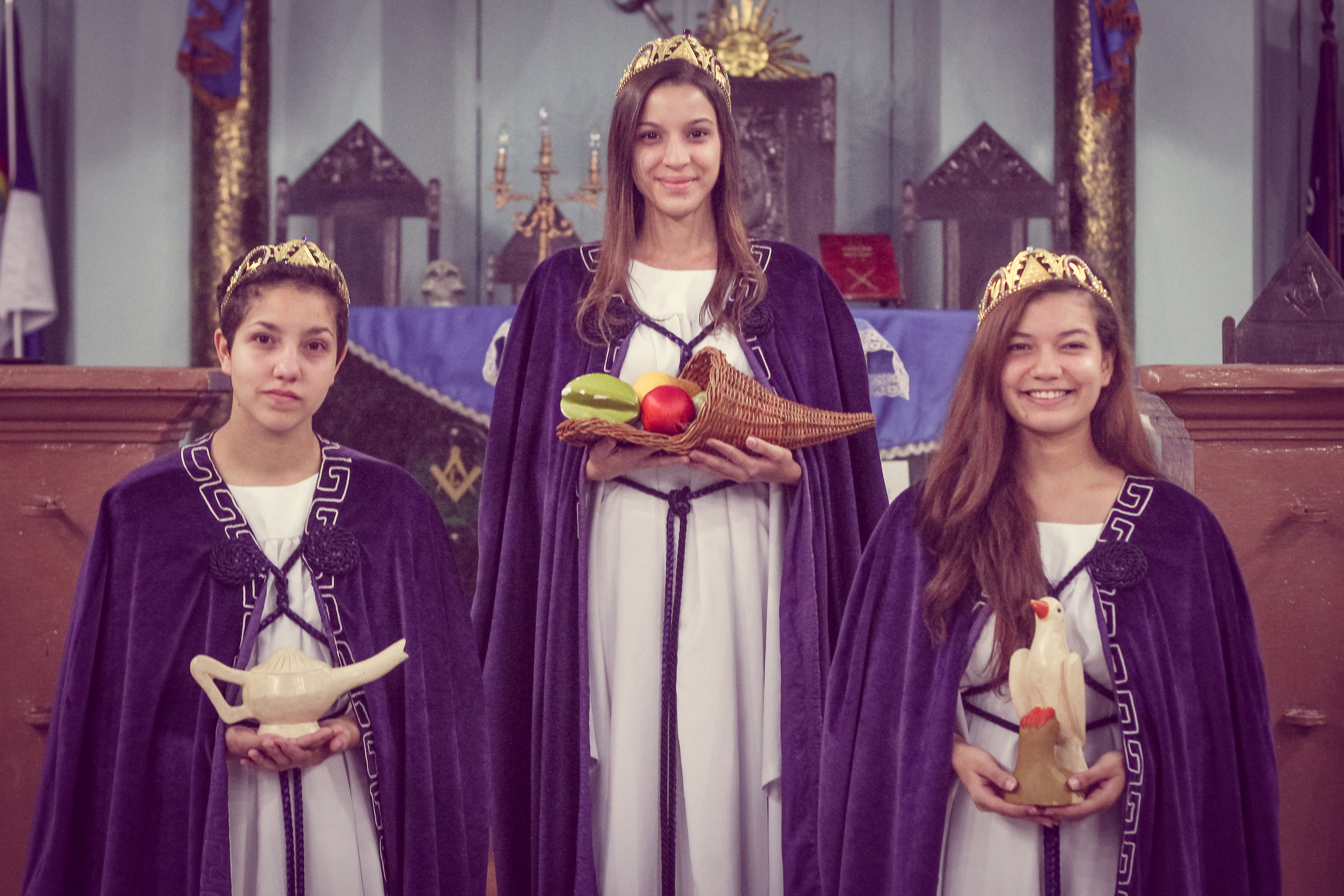 Filhas de Jó. Paramentos. Da esquerda para direitaː Primeira Princesa, Honoravel Rainha e Segunda Princesa. Paramentos e objetos.